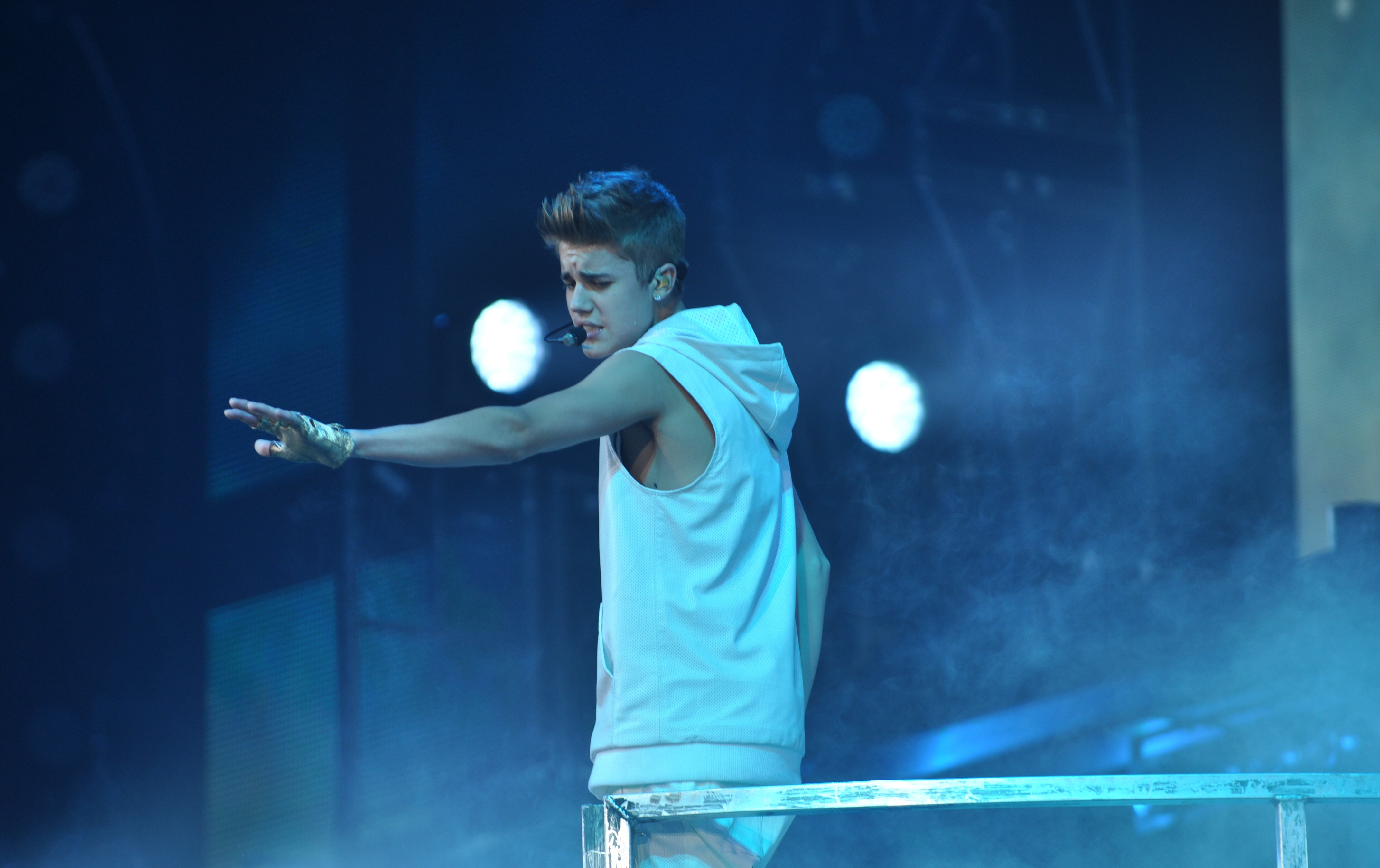 Justin Bieber -DSC_0615-10.20.12